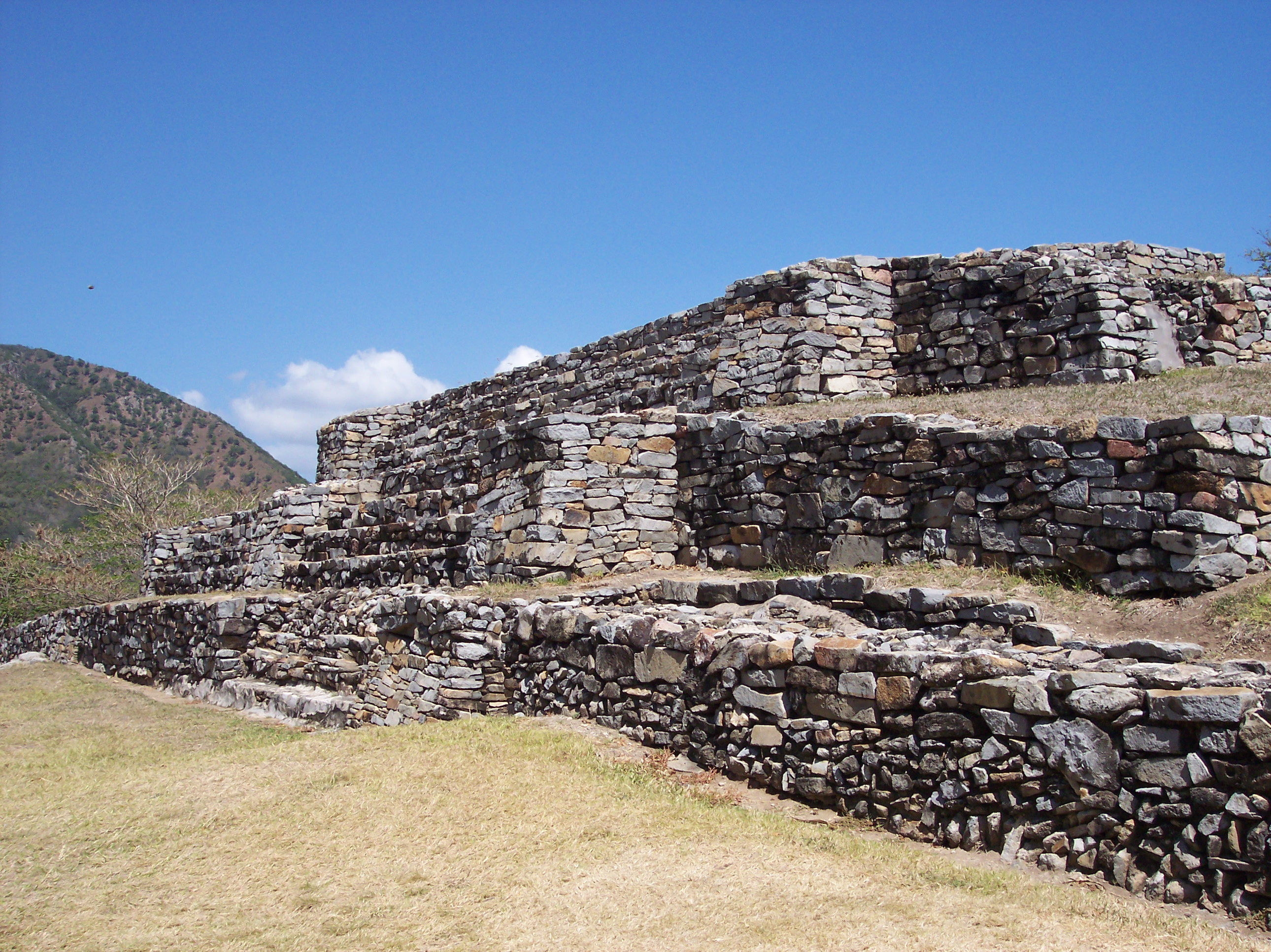 Note: Details about the photo are pending. Archeological Site Quiahuiztlan. Located in the Actopan Municipality, Estate of Veracruz, Mexico. SPANISH: Sitio Arqueológico Quiahuiztlán, Localizado en el Municipio de Actopan, Estado de Veracruz, México.